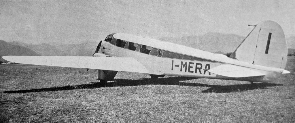 letecký motor Walter Major 6 a letoun Caproni Ca.308 Borea